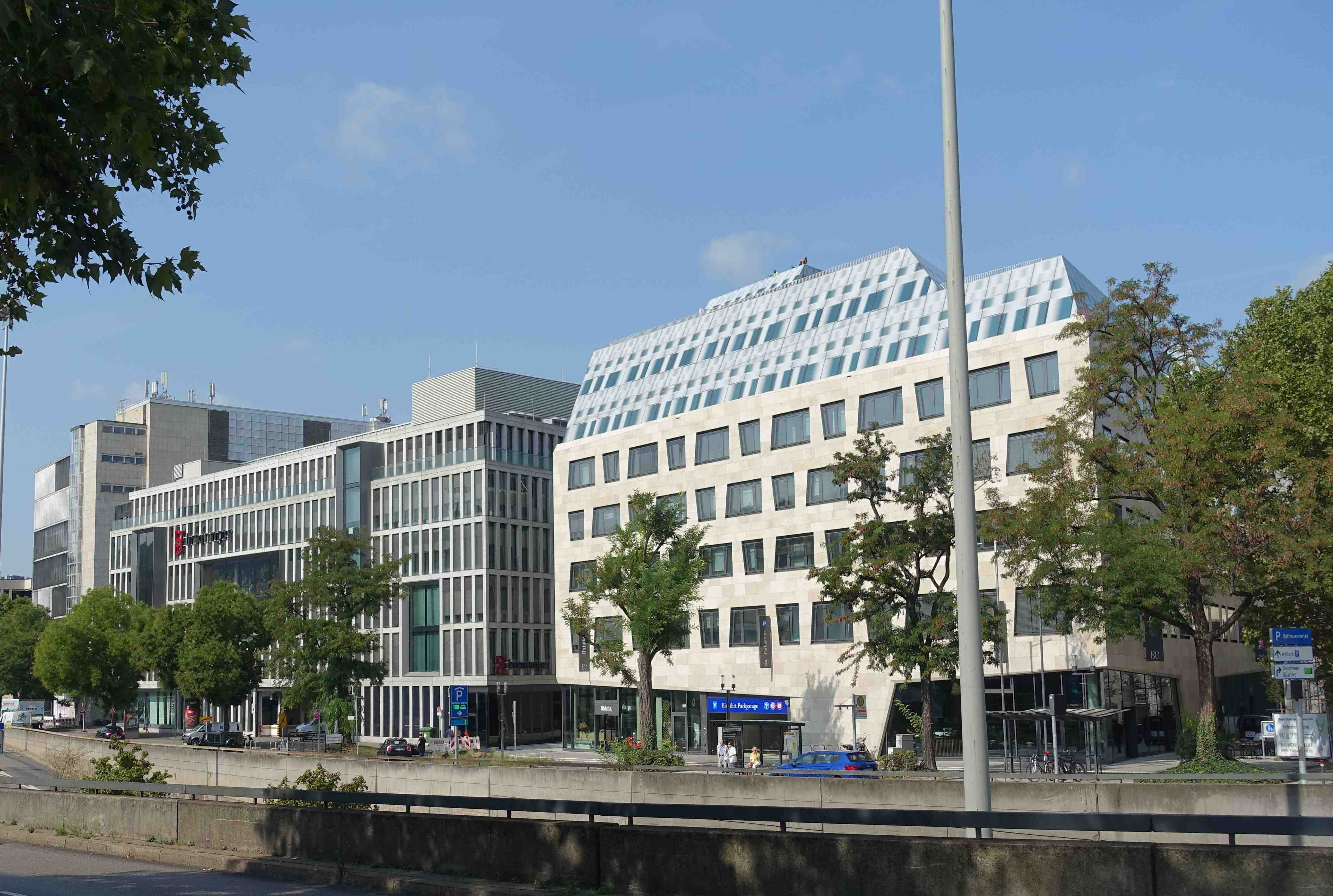 Viergiebelweg in Stuttgart von der Birkenwaldstraße aus.